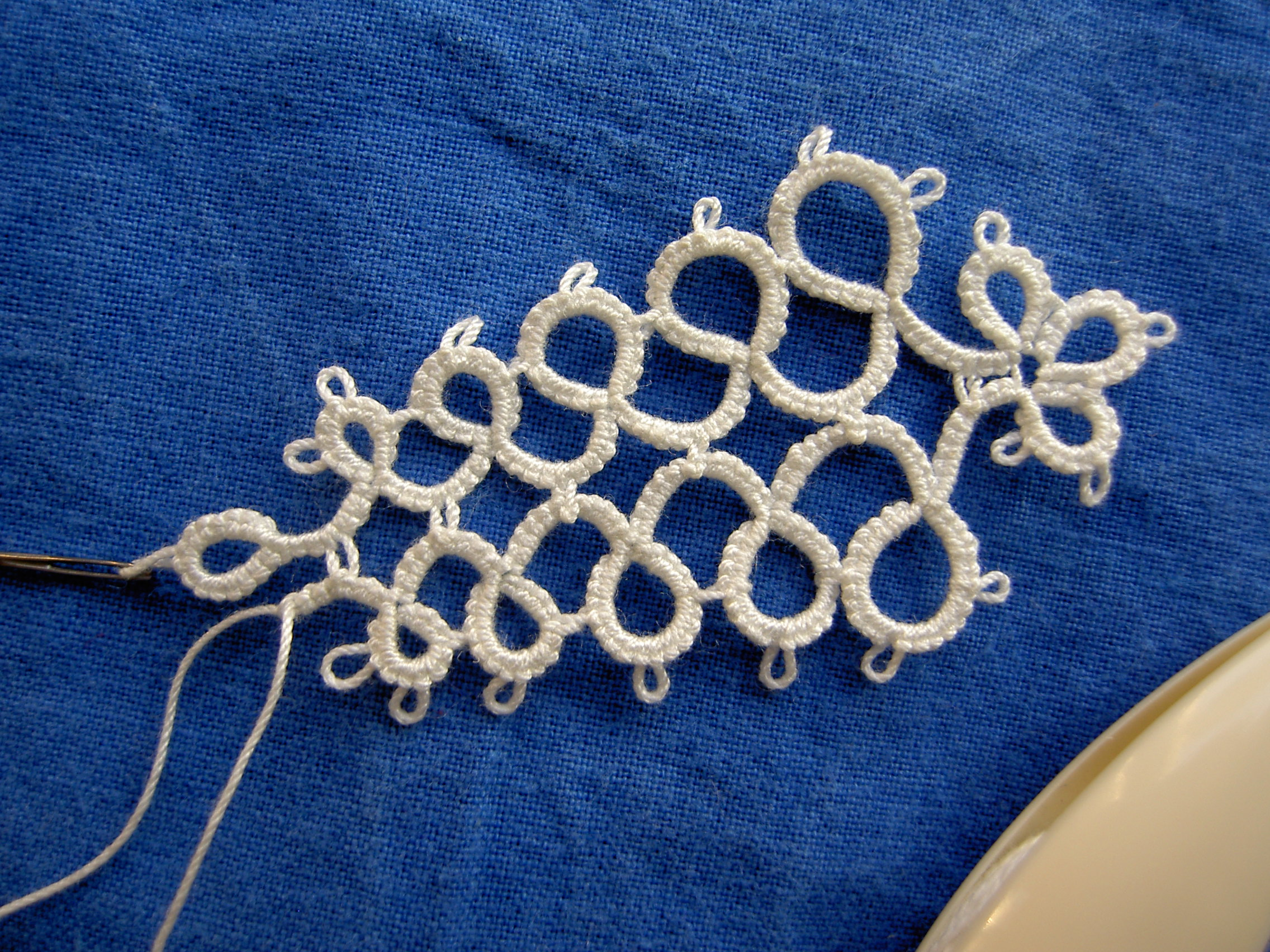 Occhi-Technik: Ringe und Pikots